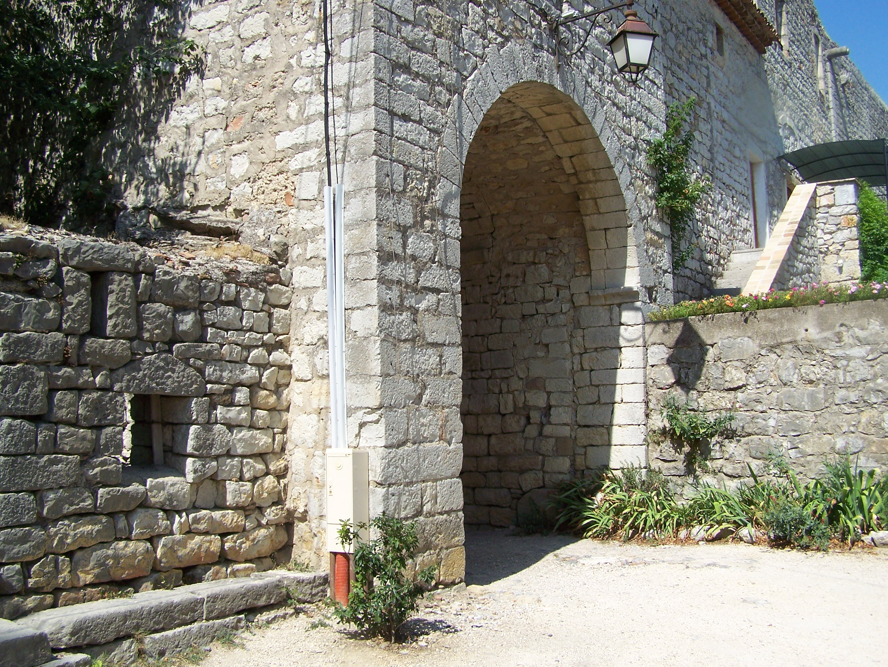 La commanderie de Jalès se situe dans la plaine de Berrias, sur la commune de Berrias-et-Casteljau située dans le département de l'Ardèche et la région Rhône-Alpes : Porte fortifiée.